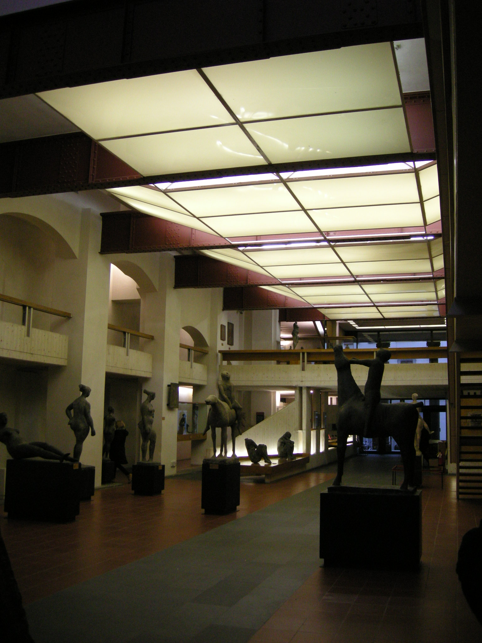 Ex-chiesa di san pancrazio